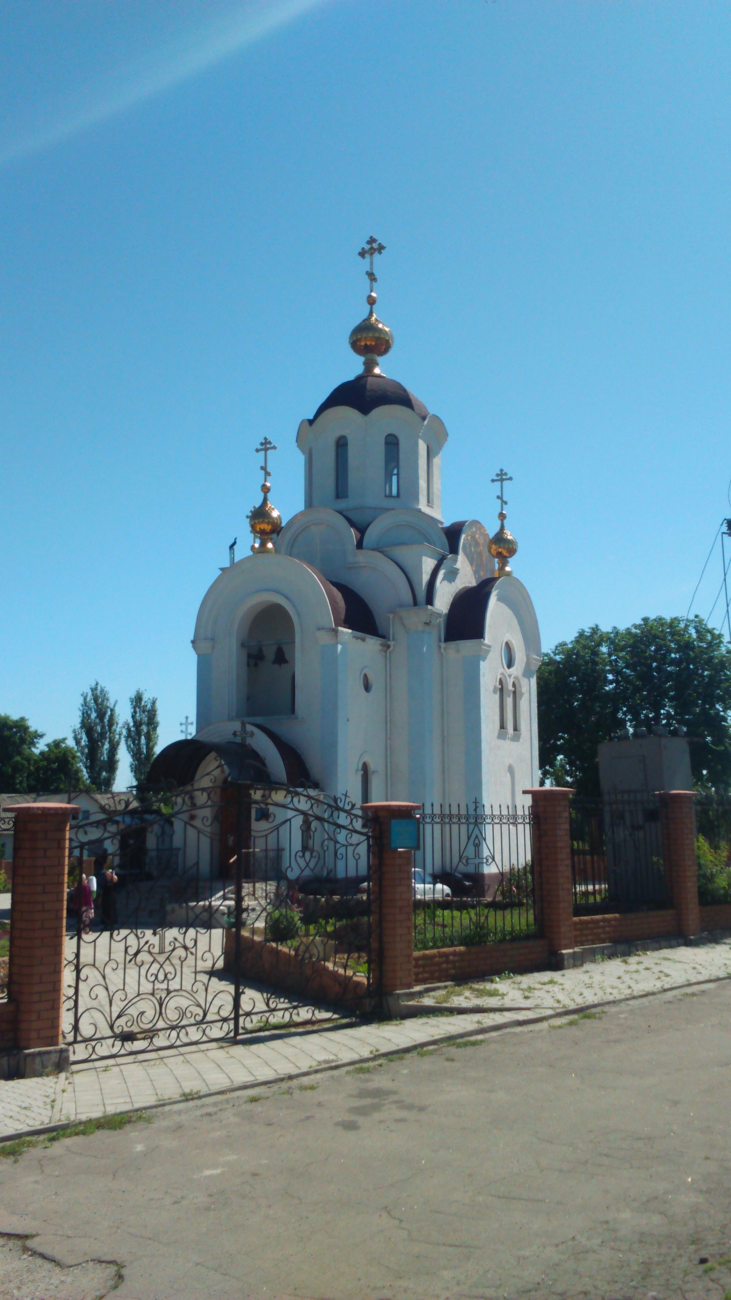 Світле — селище в Україні, Добропільському районі Донецької області, над річкою Кулічка